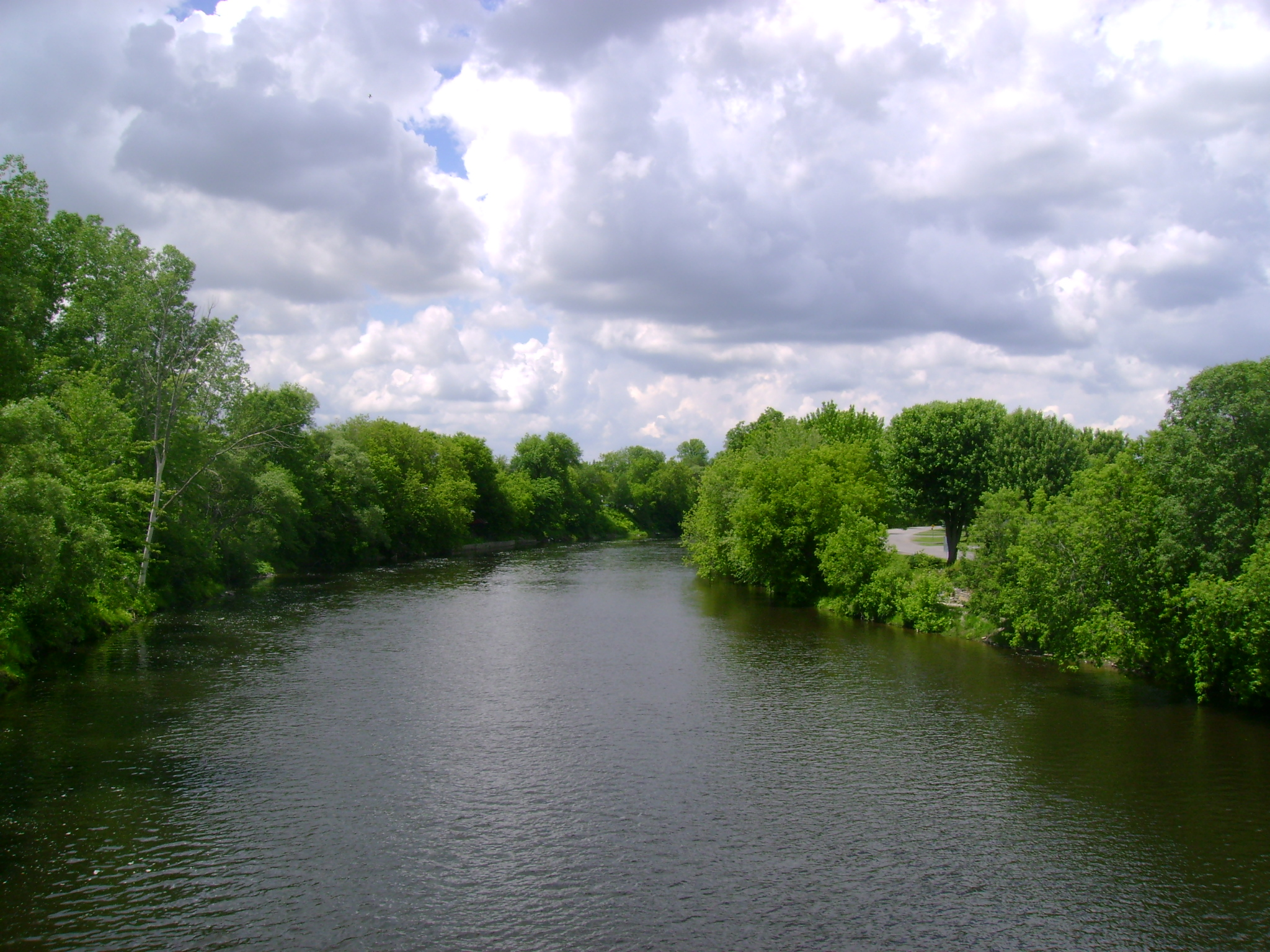 La rivière l'Assomption vue d'un pont à Joliette